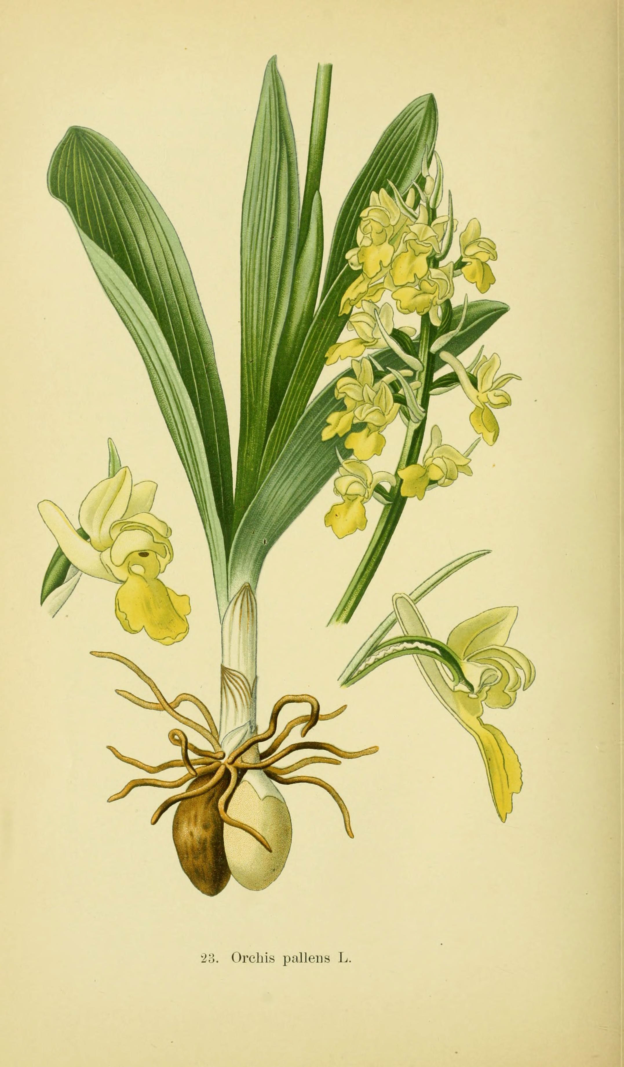 23. Orcliis pallens L